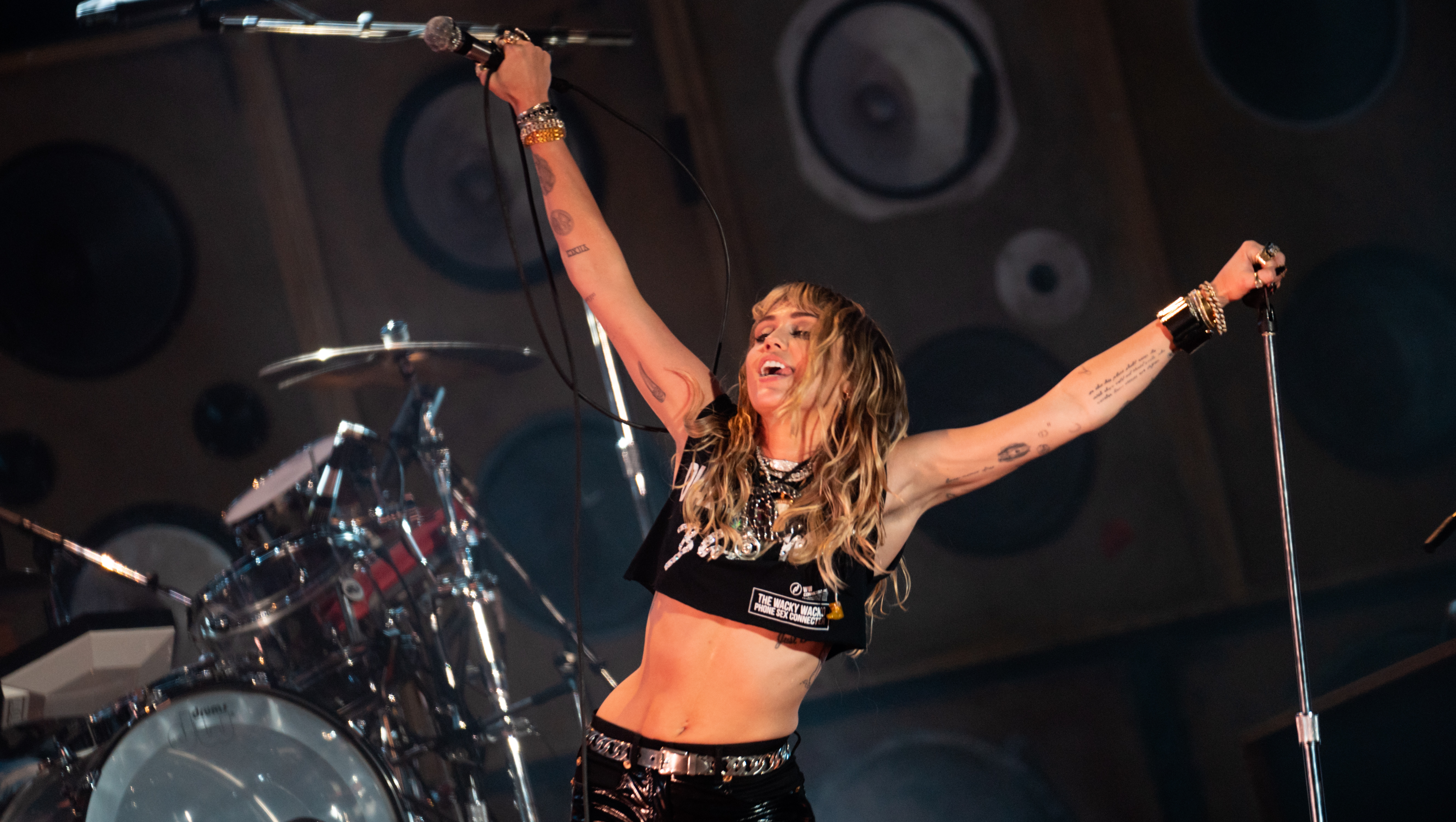 Primavera19_-248